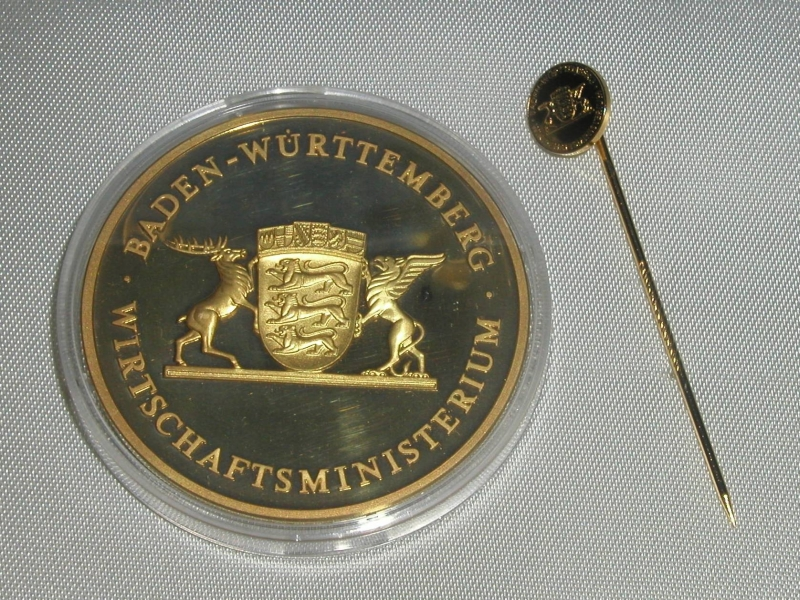 Abbildung der Vorderseite der Wirtschaftsmedaille des Landes Baden-Württemberg nebst Miniaturnadel